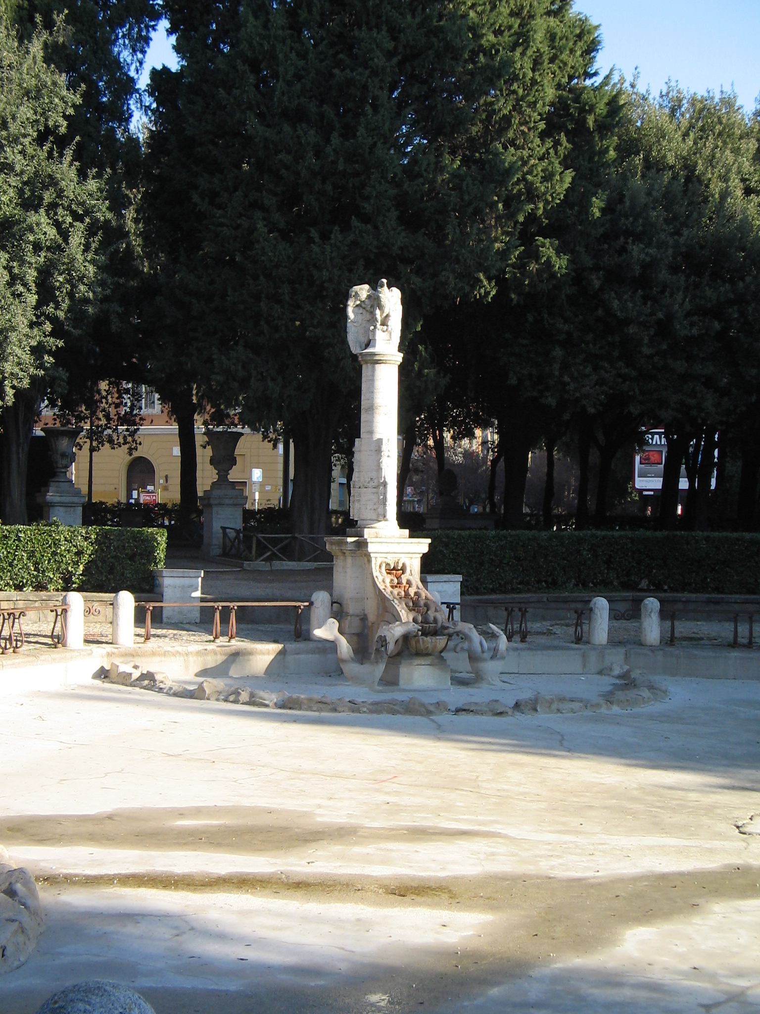 Fontana di Piazza Mazzini a Roma nel quartiere Della Vittoria